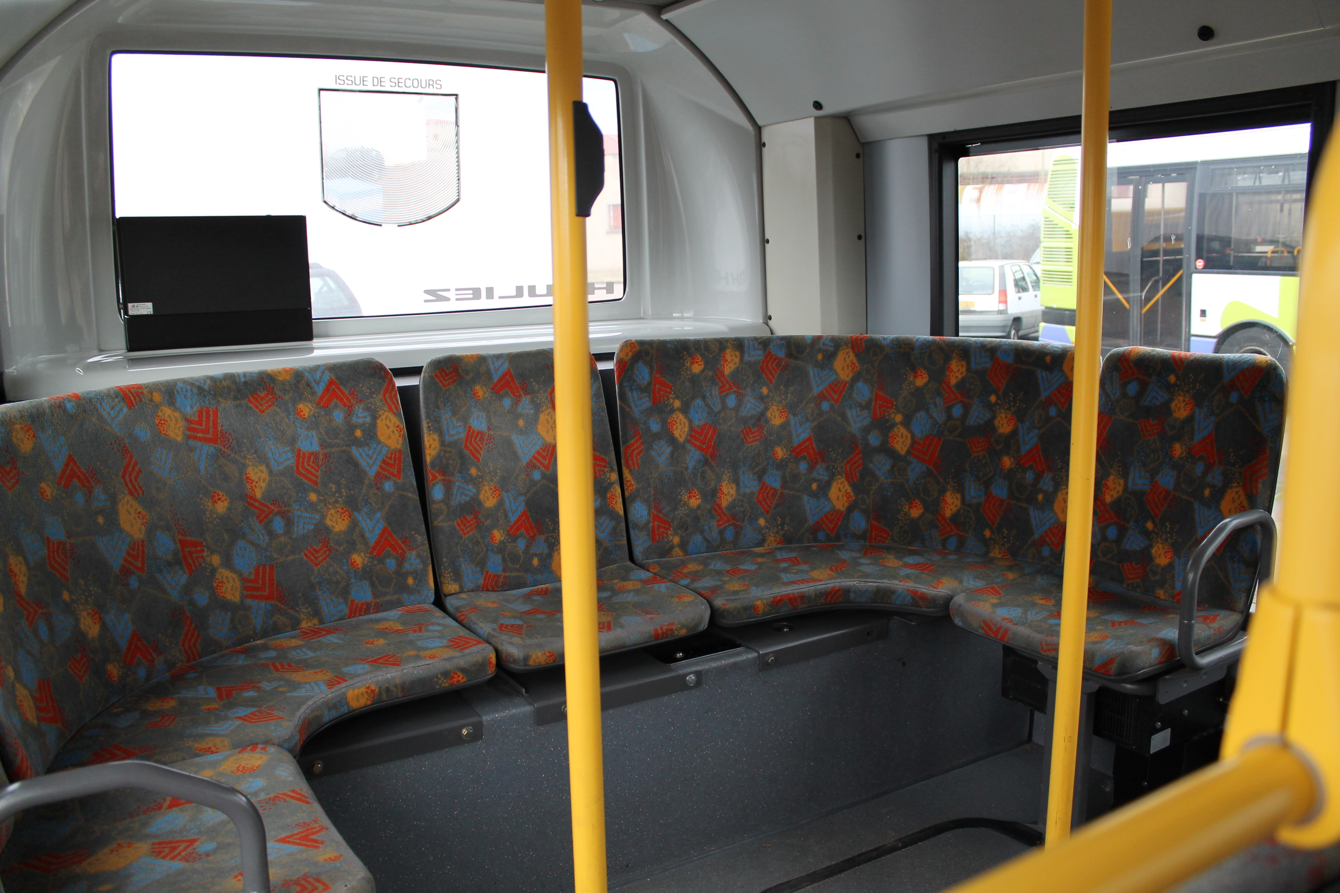 Heuliez GX 117 L n°26 intérieur - Dépôt STAR